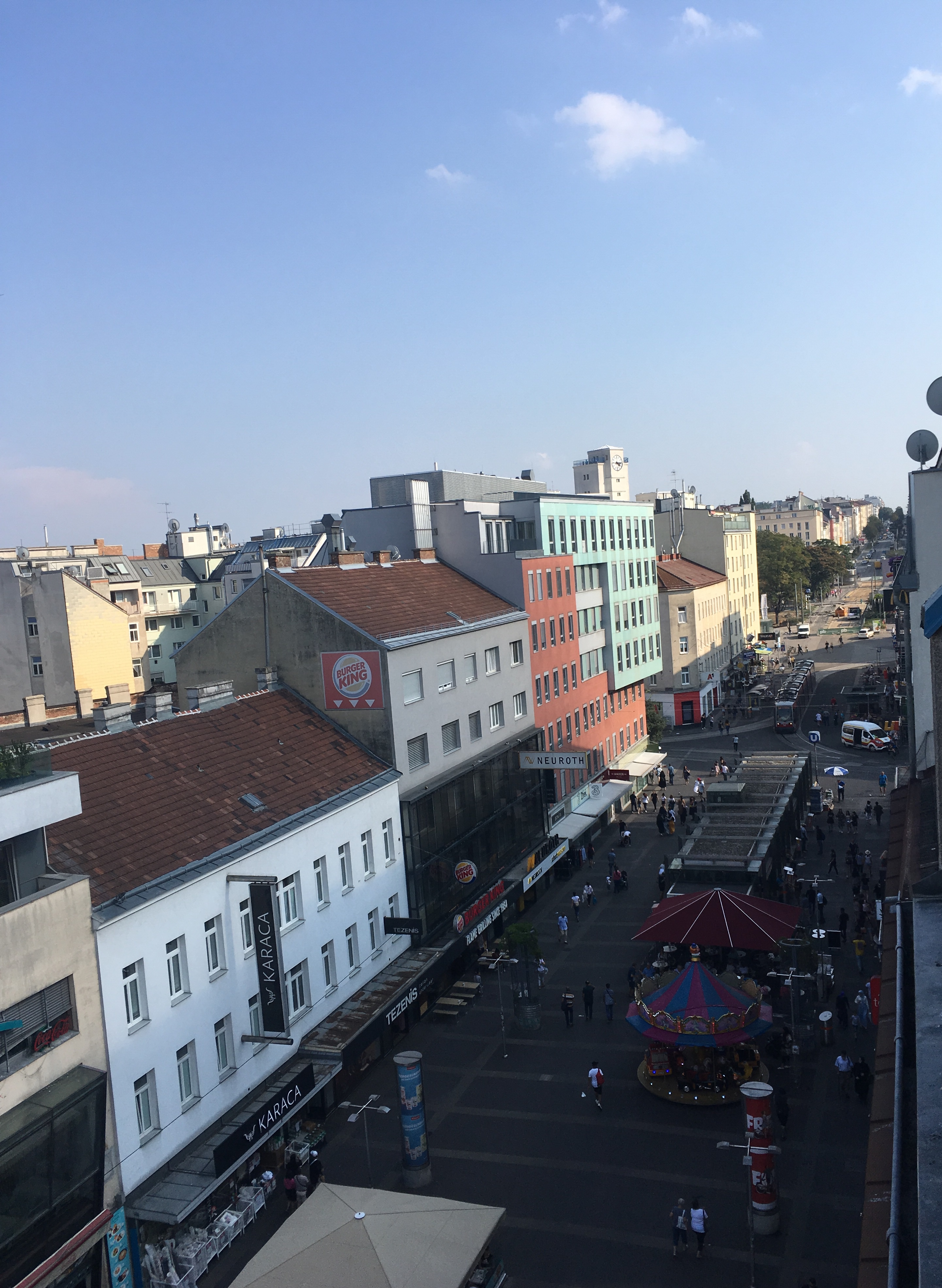 Die Fußgeherzone Favoritenstraße im 10. Bezirk Wiens (Favoriten)